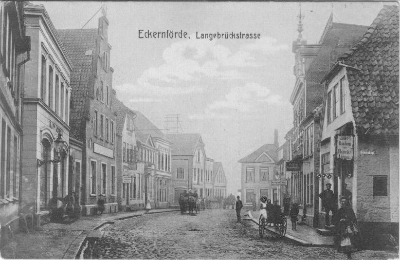 Eckernförde Langebrückstraße (historic image)